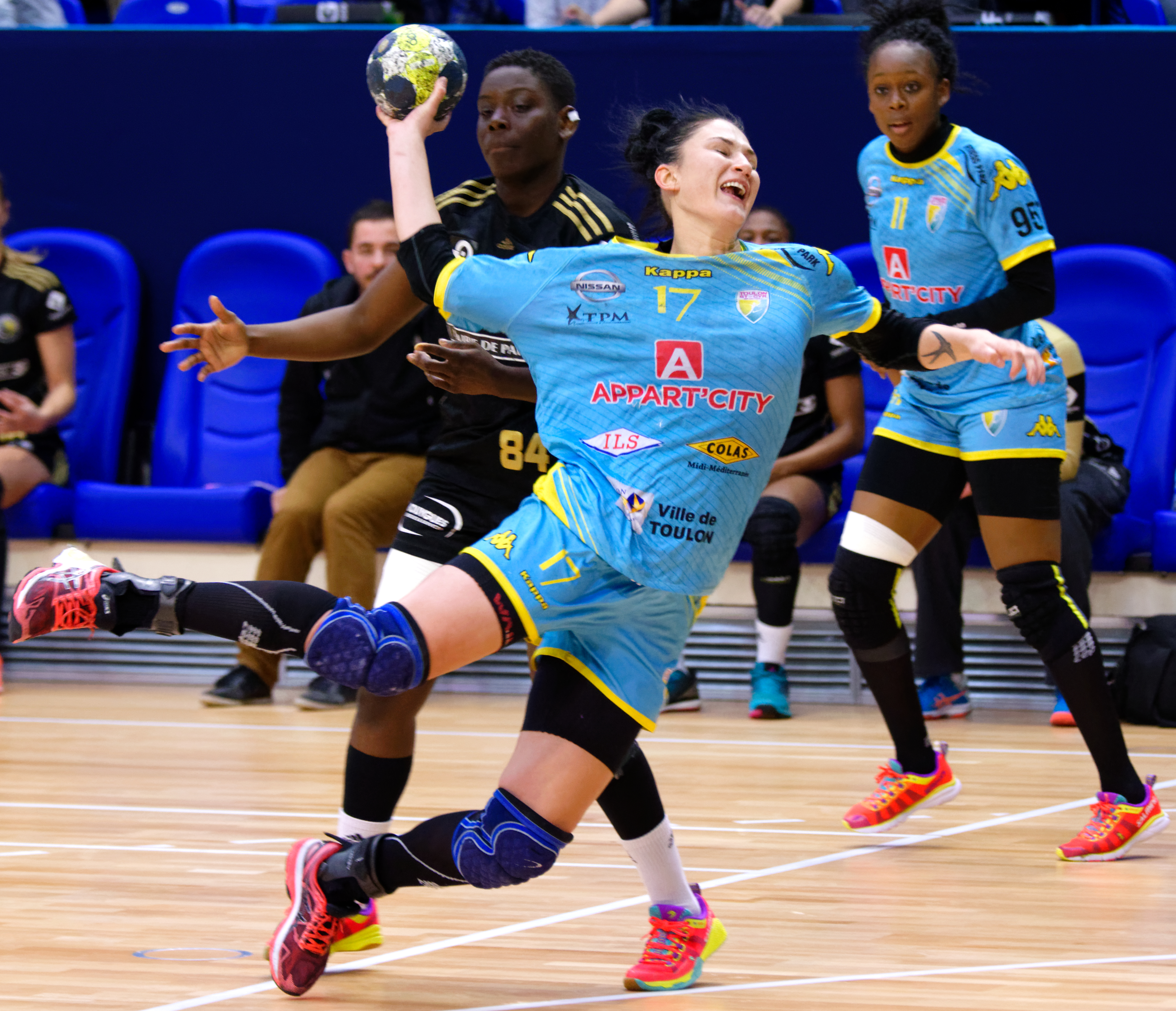 Rencontre de quart de finale retour des playoffs entre Issy Paris Hand et Toulon St Cyr. A Coubertin, le 7 mai 2017.